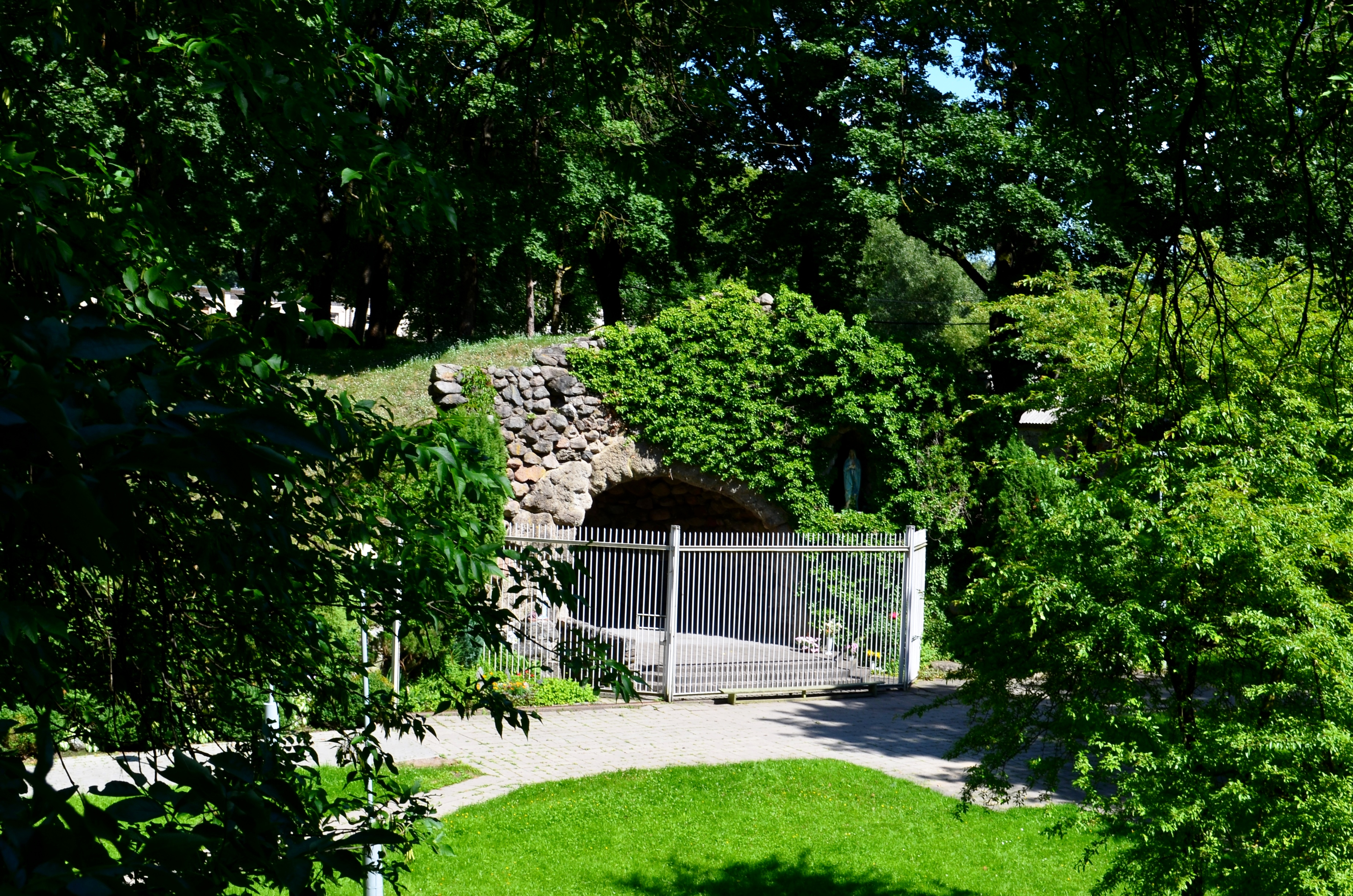 Kretingos Marijos šventykla prie Dopulties upelio